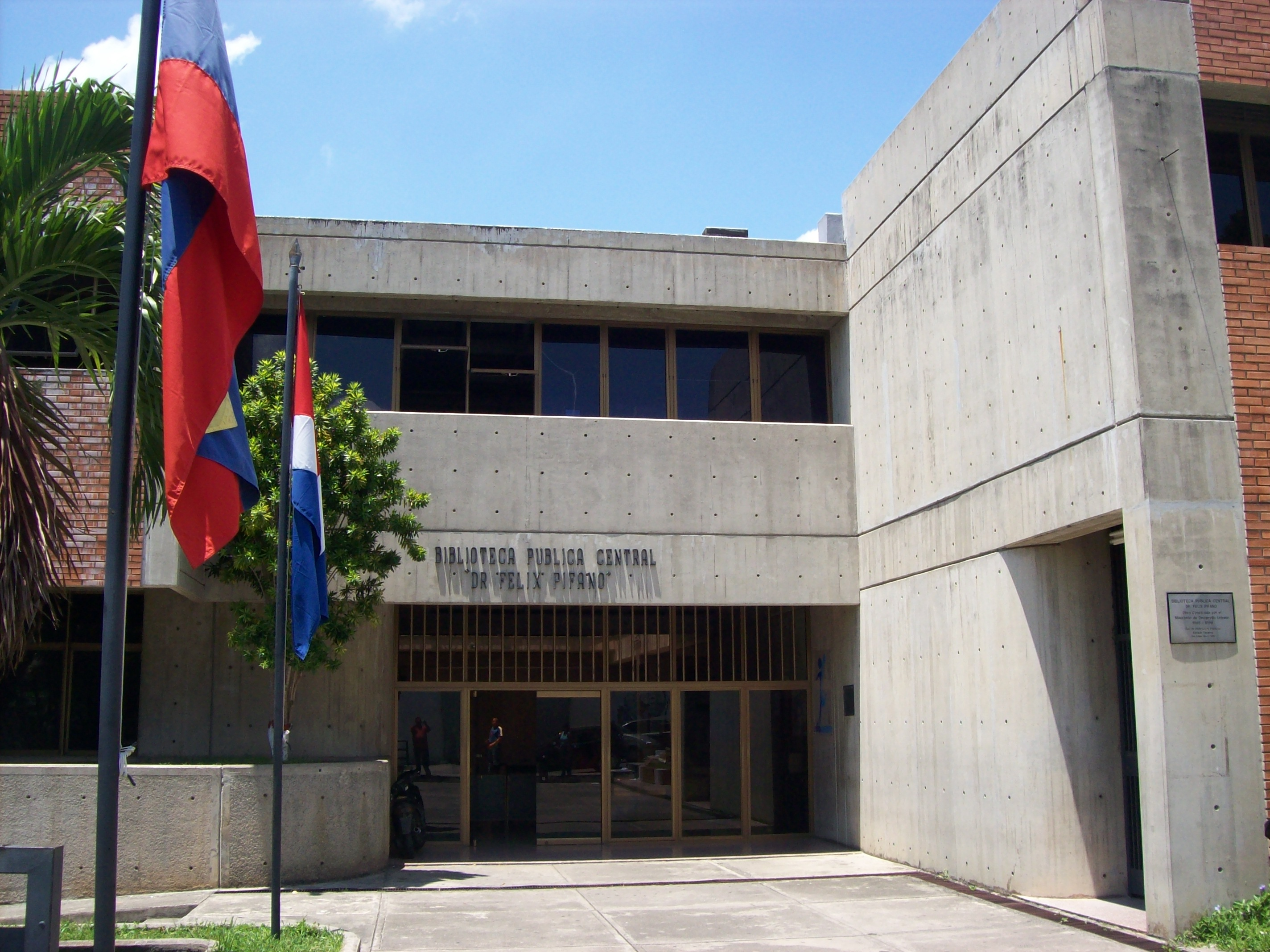 Biblioteca Pública Central Dr. Felix Pifano, San Felipe, Edo. Yaracuy, Venezuela.